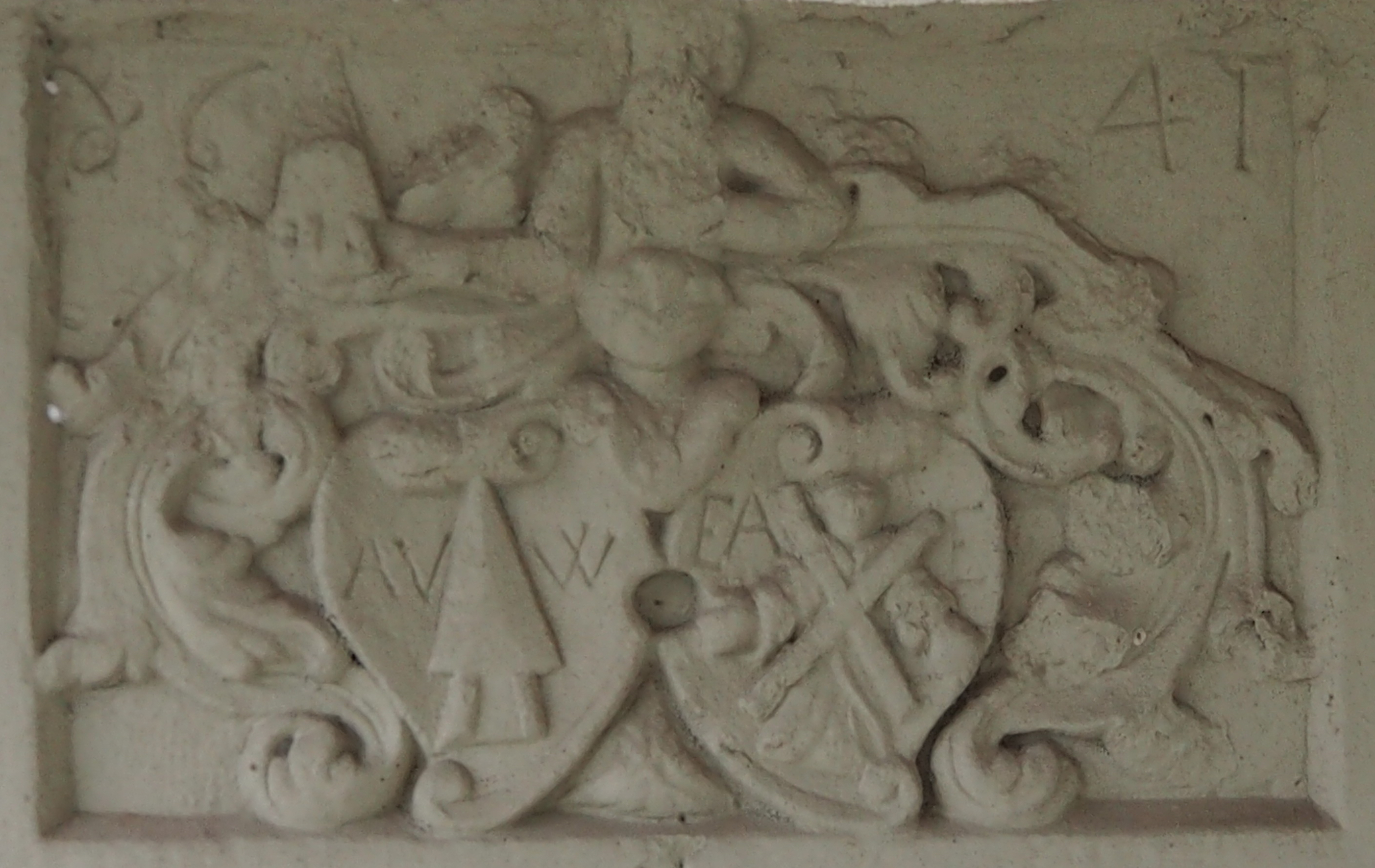 Schlössli Zimmerwald, Supraporte von 1641, Wappenallianz Abraham von Werdt (1594–1671), Gerbermeister, Herr zu Toffen, Venner zu Gerwern und Deutschseckelmeister, und Elisabeth Andreae (1595–vor 1666).